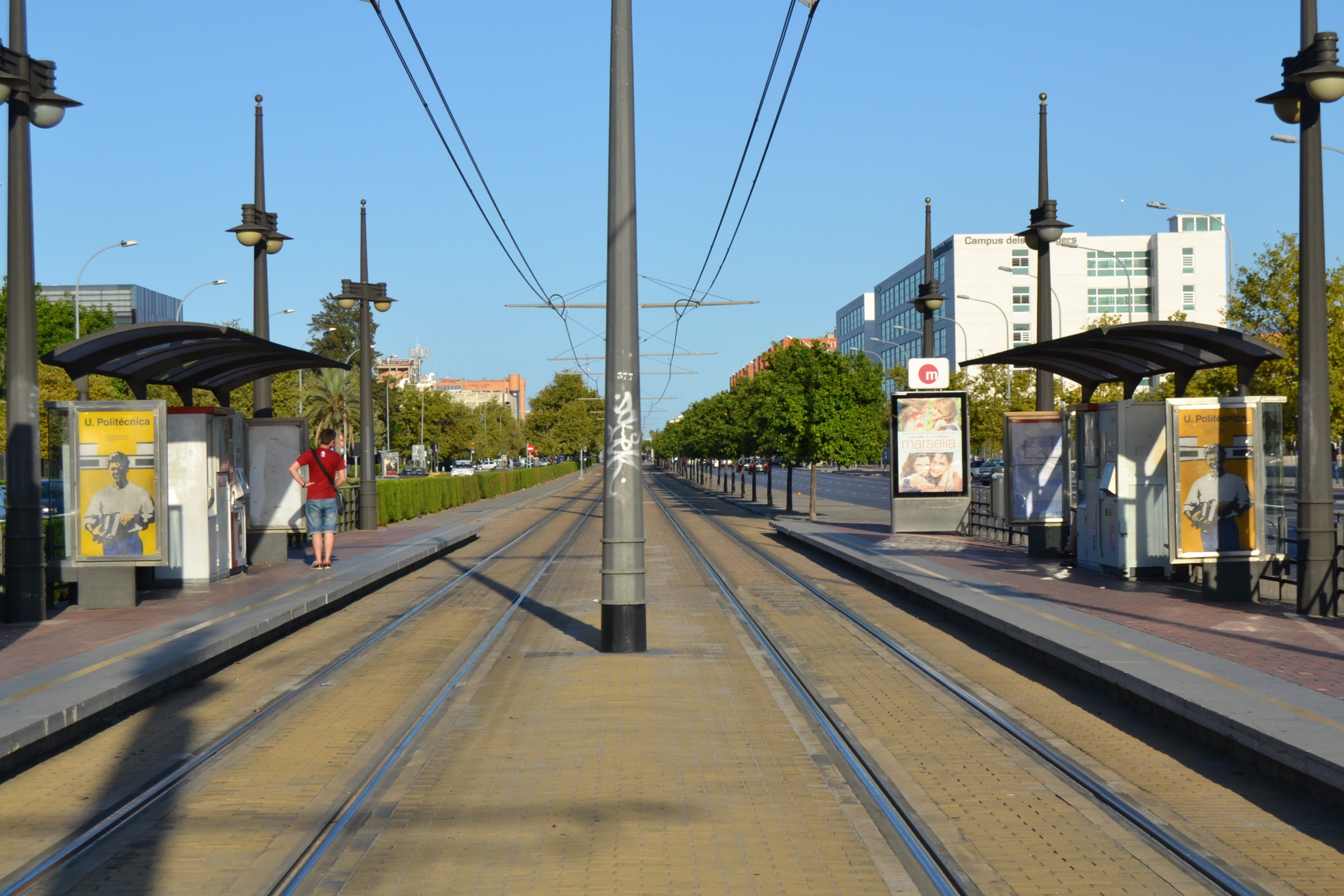 Estació de la Universitat Politècnica, tramvia de València.